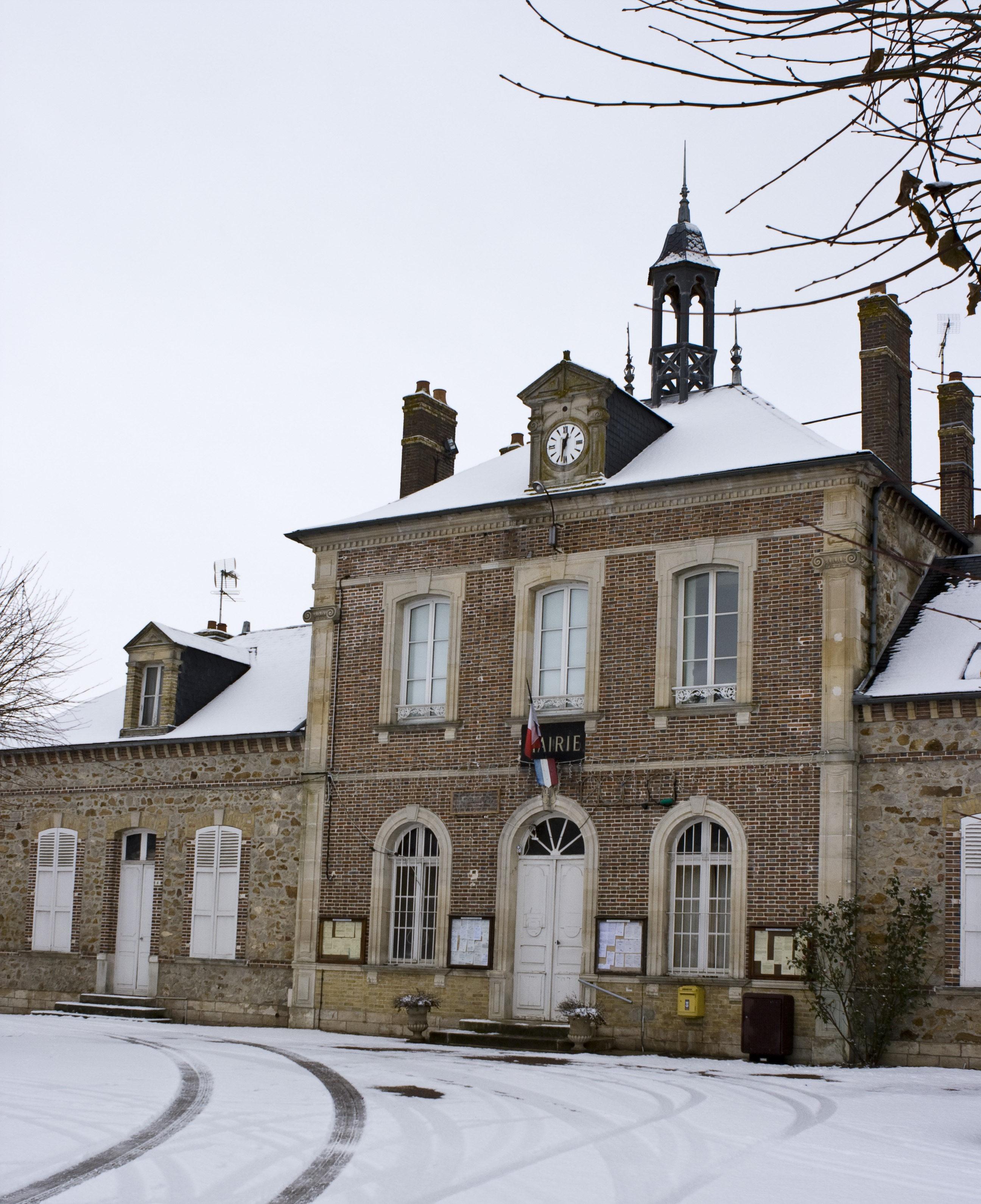 Mairie de Marnay-sur-Seine (Aube, France) hiver 2010